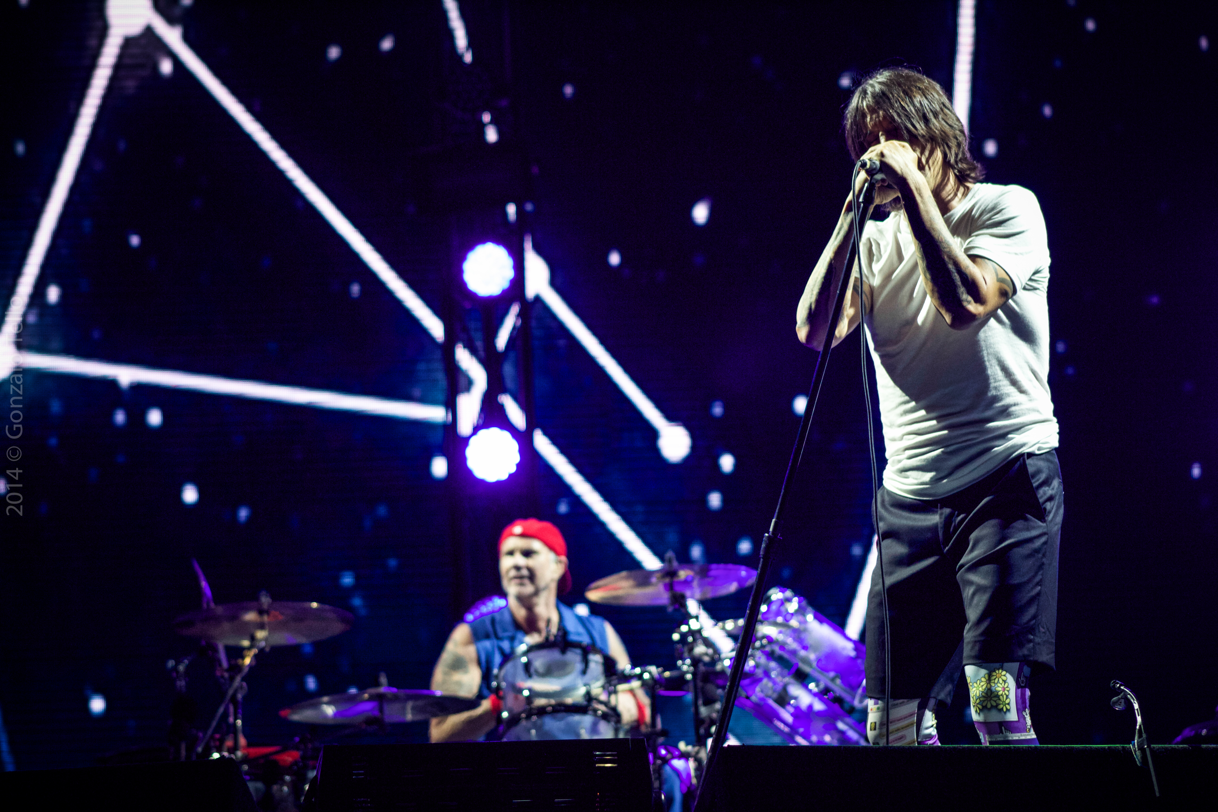 Foto: Gonzalo Tello Todos los derechos reservados